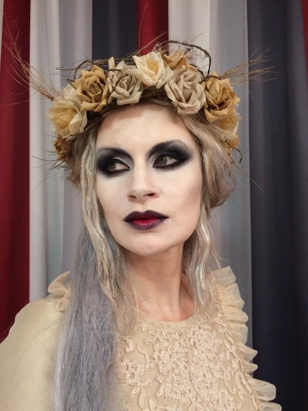 Edyta Piasecka jako Goplana w tytułowej roli opery Wacława Żeleńskiego; autoportret samowyzwalaczem